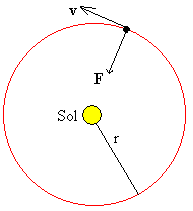 Movimento dos planetas